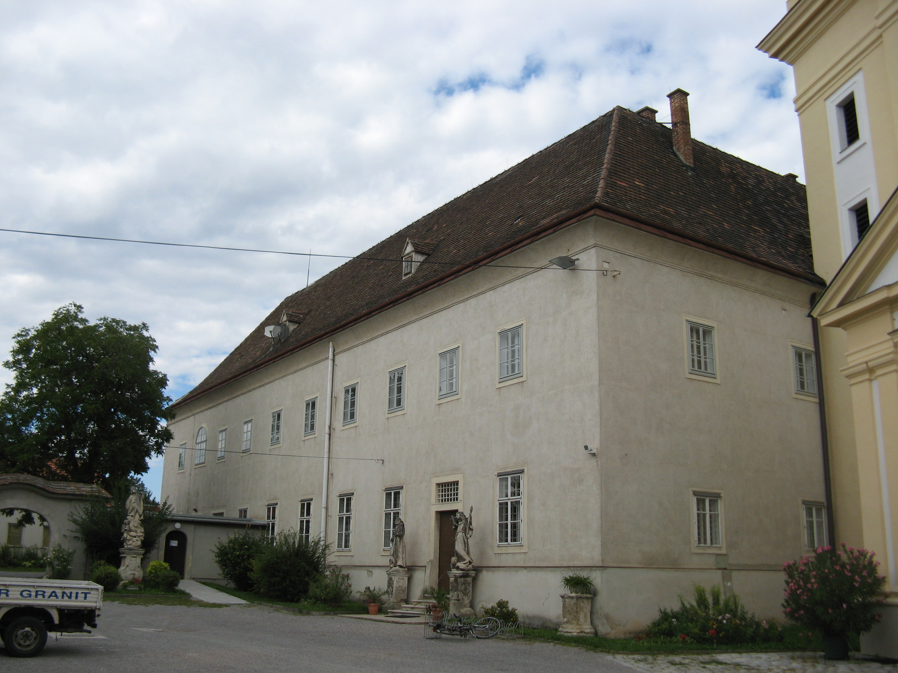 Klostergebäude, Wallfahrtskirche Maria Lanzendorf, Niederösterreich